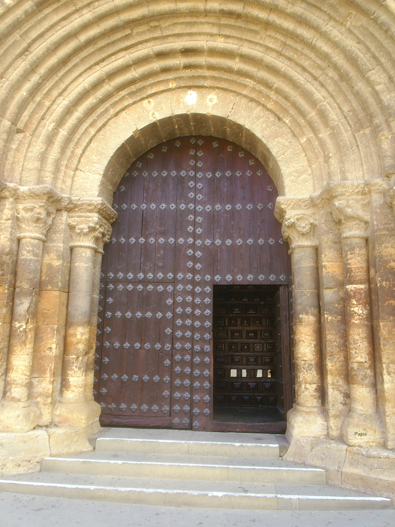 Puerta de la Iglesia del Monasterio de Fitero Navarra España